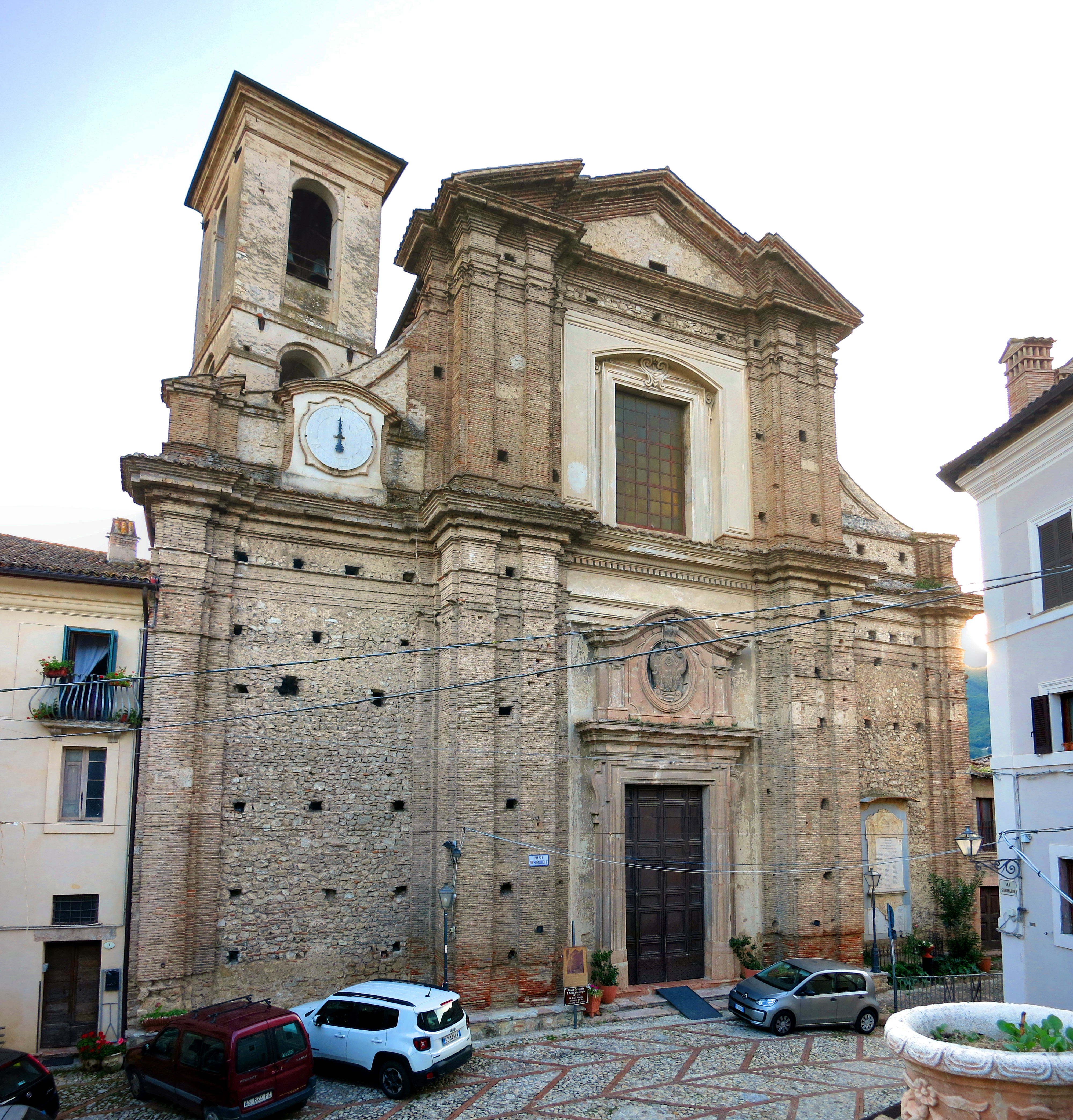 Facciata della chiesa collegiata di San Michele Arcangelo - Contigliano, provincia di Rieti, Lazio